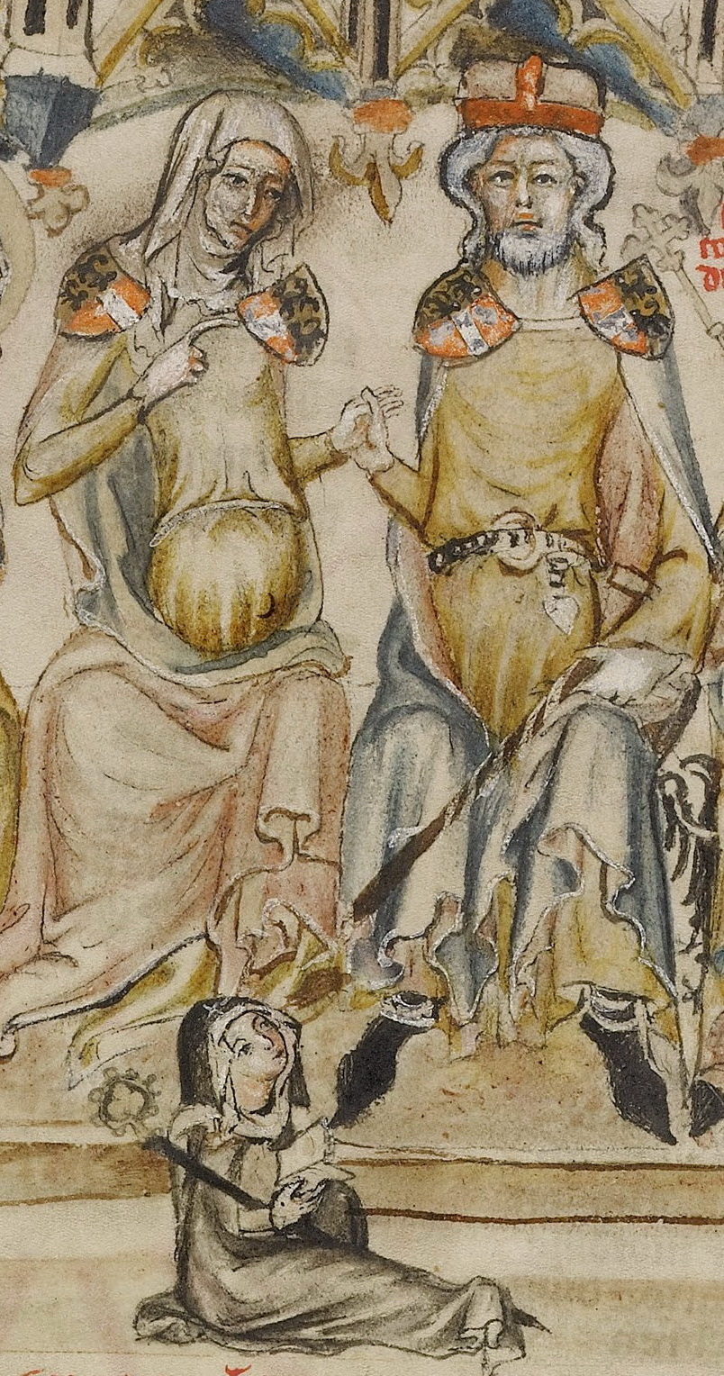 Anežka z Rochlitz s manželem Bertoldem IV. z Andechsu a u nohou sedící dcerou Mechtildou